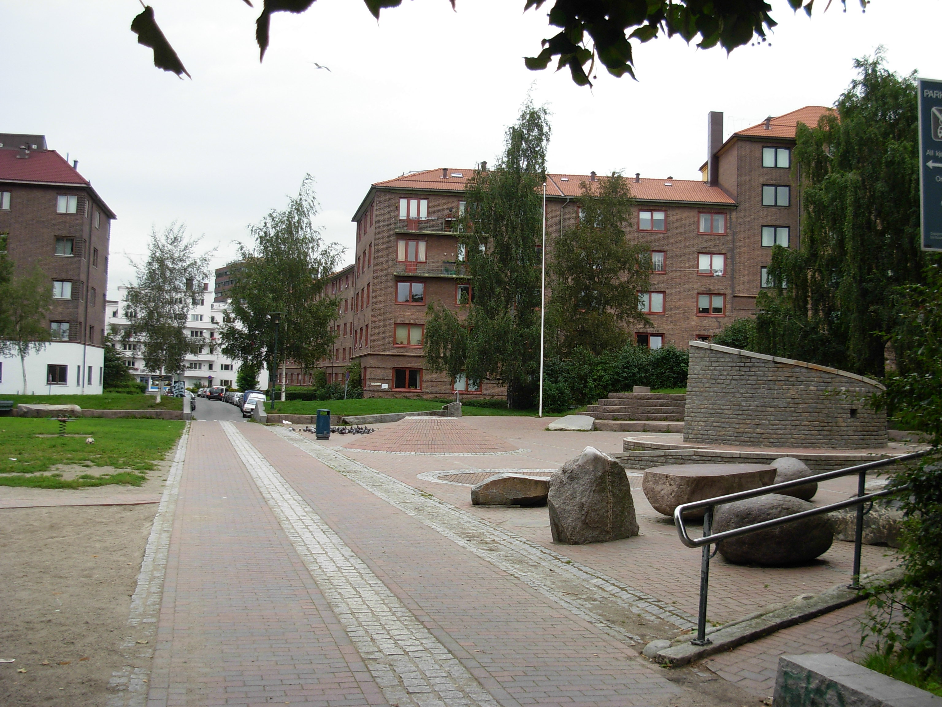 Sommerfrydhagen, sett fra syd, Tøyen, Oslo